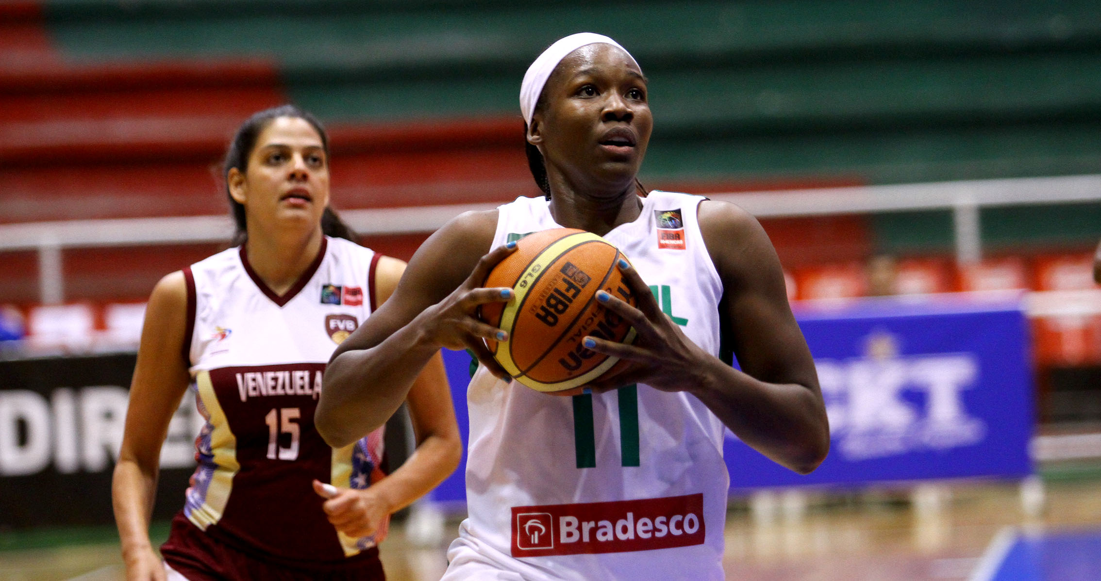 Ambato (Tungurahua) 14 de agosto de 2014 (Andes).- Inició el Campeonato Sudamericano de baloncesto Femenino Ambato 2014. Venezuela (blanco-vino) vs Brasil (blanco-verde).